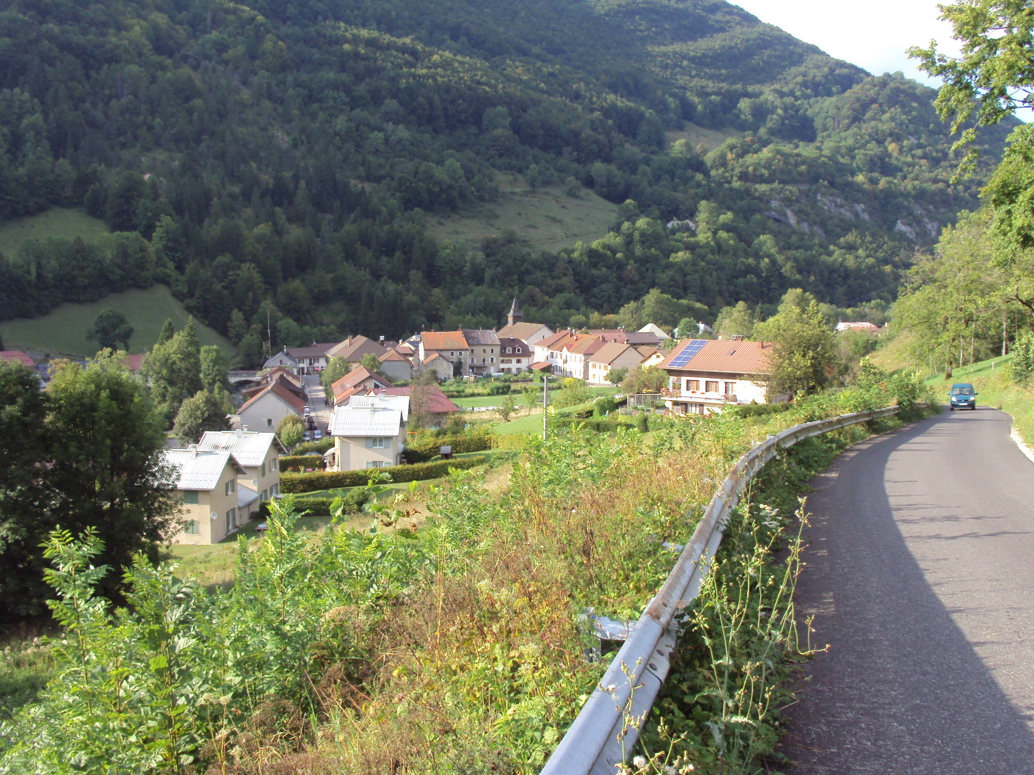 Village de Chézery, commune de Chézery-Forens, Ain, France.